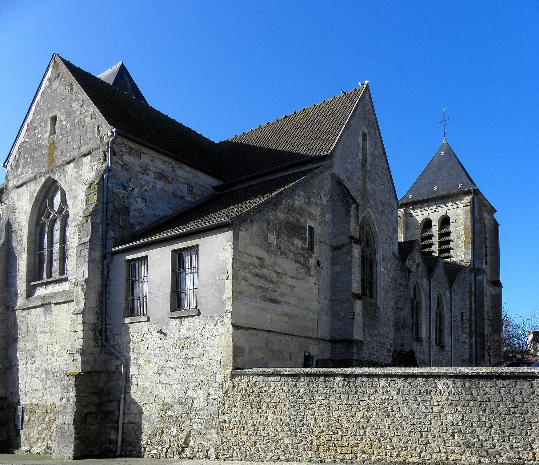 Église Saint-Germain de Betz (60). Chevet, sacristie et flanc nord.